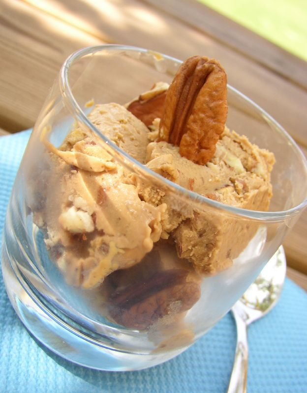 Butter pecan caramel ice cream